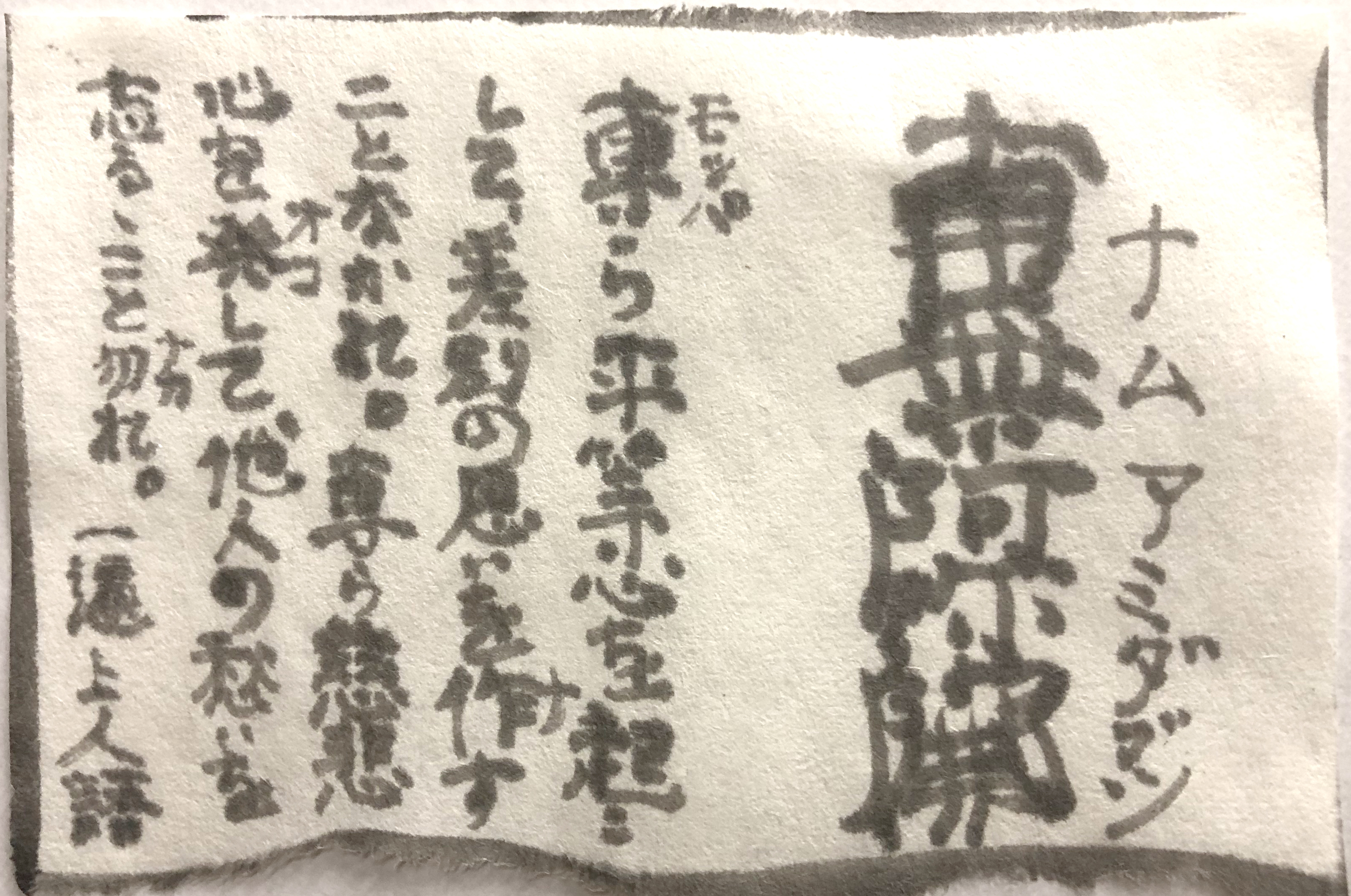 一遍上人の語録と共に、「南無阿弥陀仏」の文字を仏像の姿に模した書